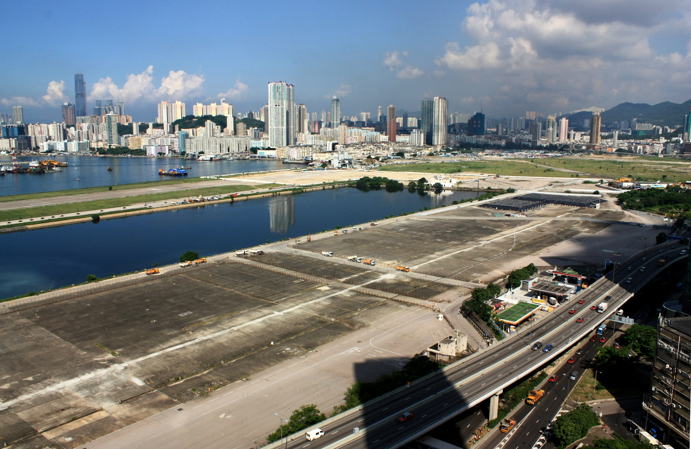 HK Kai Tak Airport Site